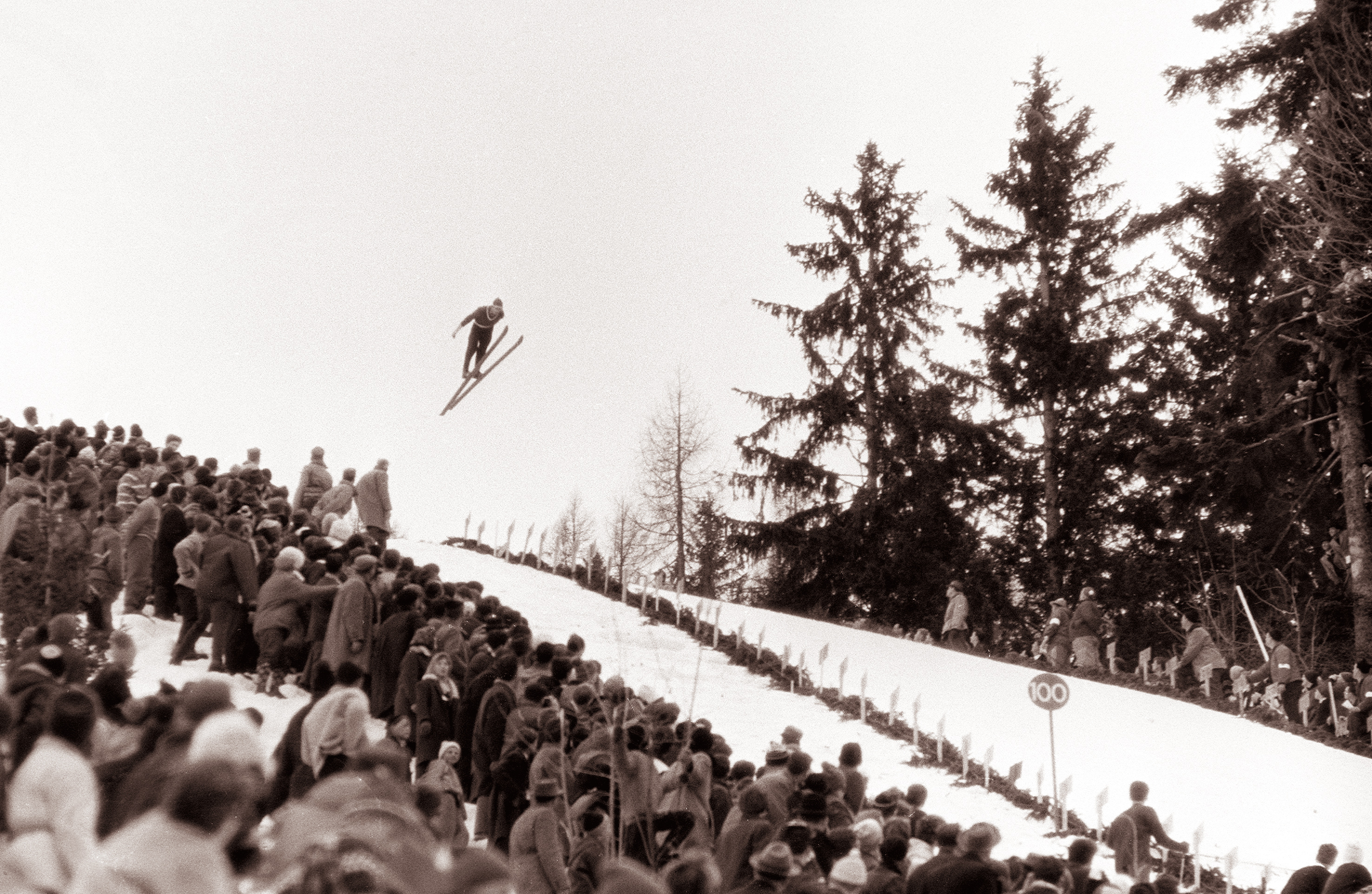 Tekma v smučarskih poletih na Kulmu.